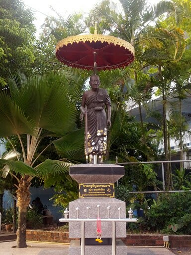 ผู้ก่อตั้งโรงเรียน